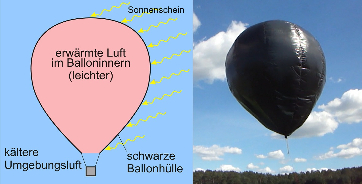 Schematische darstellung der Wirkungsweise eines Solarballons sowie zum Vergleich ein realer Solarballon.